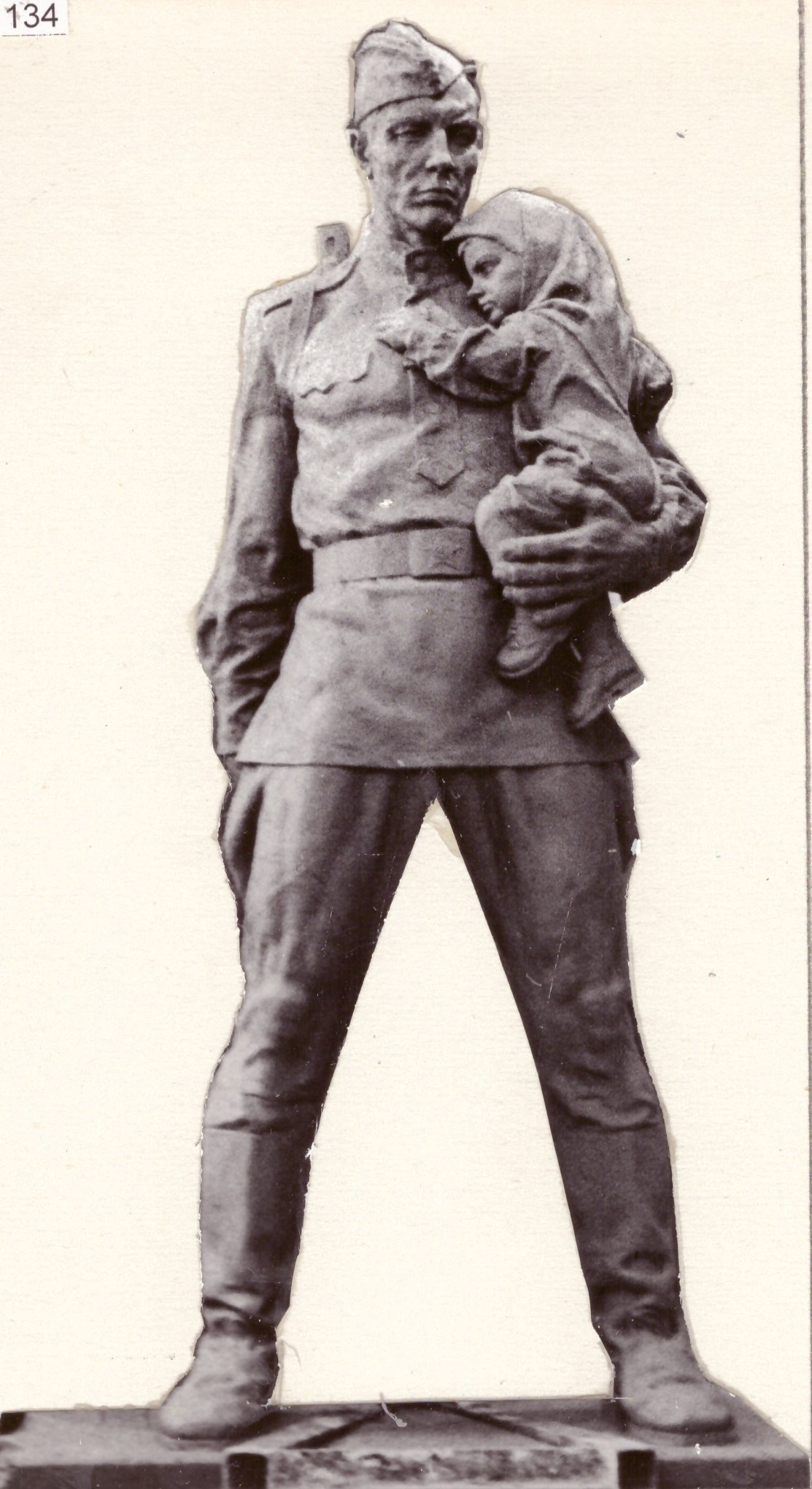 Пам’ятник загиблим воїнам-односельчанам в роки Великої Вітчизняної війни 1941-1945 р.р. С. Крилівка Ружинський район Житомирська область. 1976. Скульптор Таранченко В.О. Литий бетон.